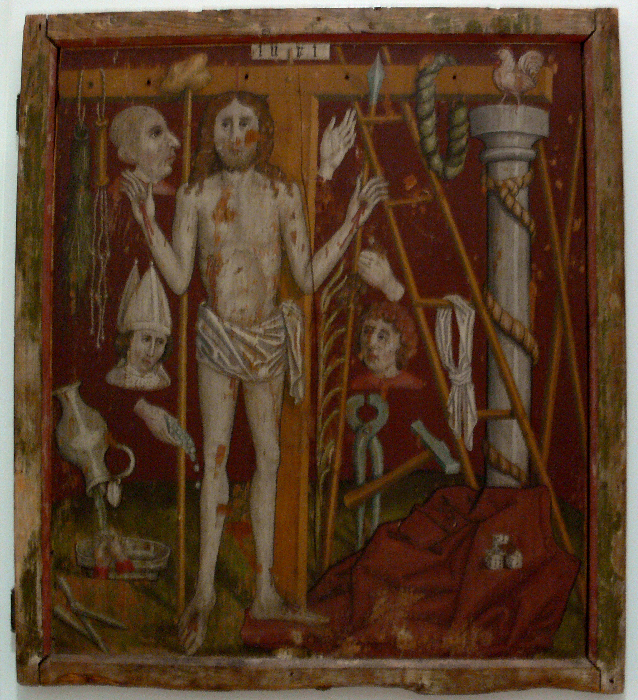 Wundenweisender Schmerzensmann mit Arma Christi, Mittelstück (?) eines Flügelaltars (Rückseite), 1468; Vorarlberger Landesmuseum, Bregenz; aus Wald am Arlberg (Gemeinde Dalaas)